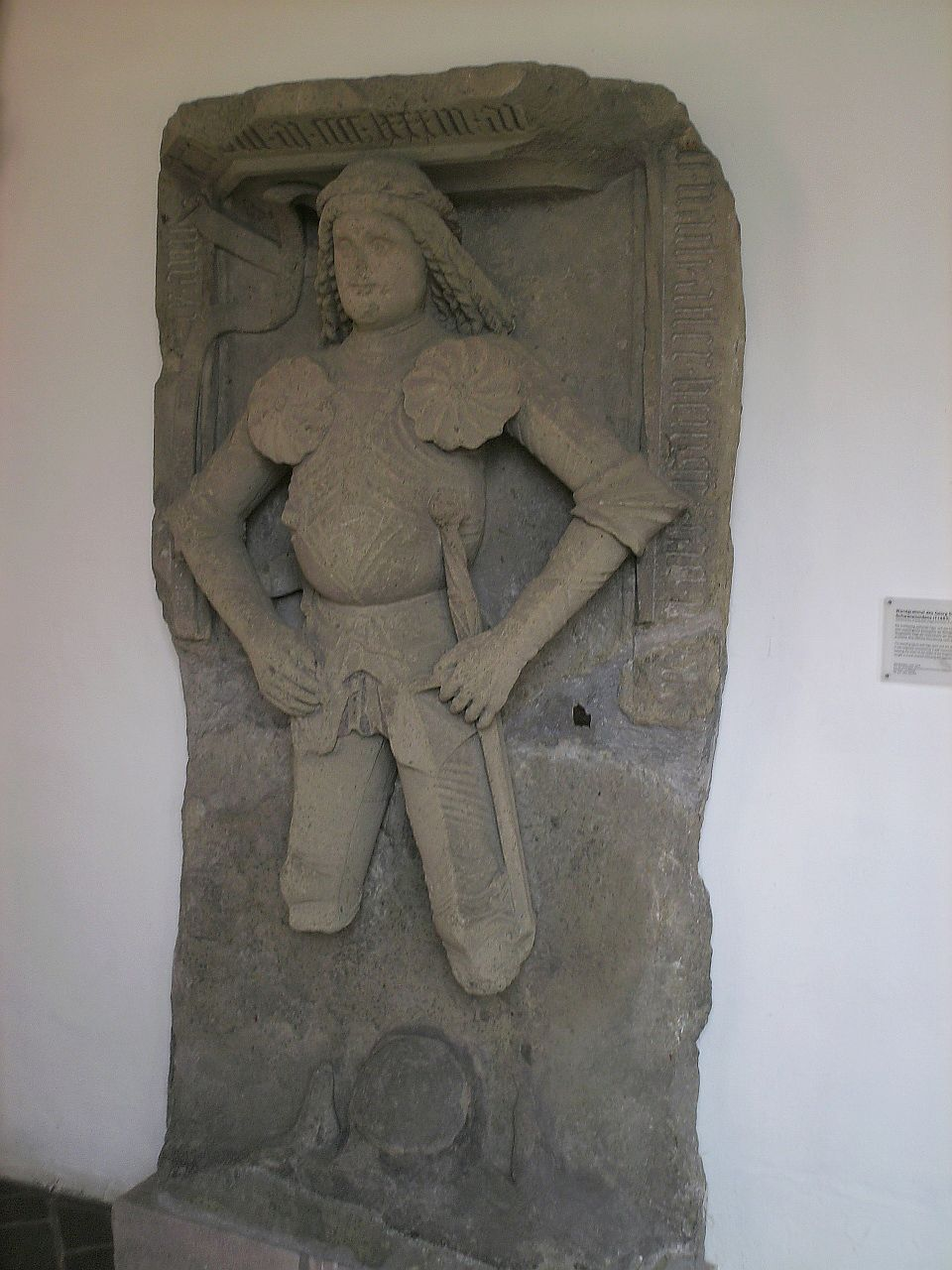 Grabplatte d. 1483 verstorbenen Georg Sack, der hier als Ritter des Schwanenordens dargestellt ist. Die breitbeinig stehende Figur und das Fehlen eines Polsters deuten auf ein Wandgrabmahl. Die Statue trägt die Ordenskette der Schwanenritter um den Hals. Entstanden in Mittelfranken um 1476 und ursprünglich in der Zisterzienserabtei Heilbronn aufgestellt, heute Römisch-Germanisches Museum in Nürnberg.